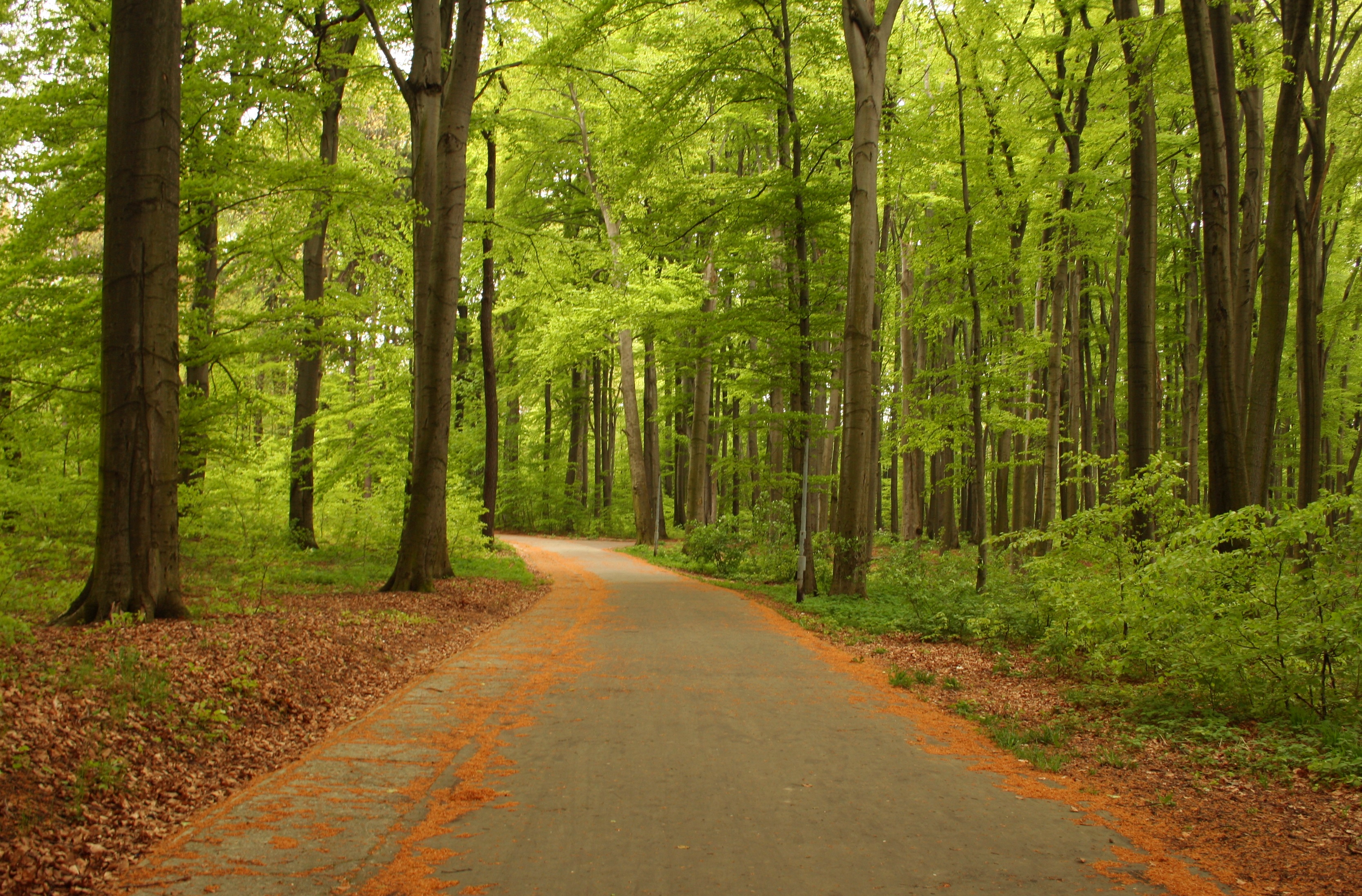 Park w Reptach Śląskich (Tarnowskie Góry), Polska, województwo śląskie